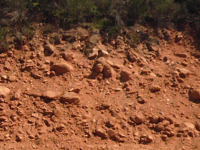 Matriz de raña en la parte alta del depósito. El Rabizo, La Robla (León, España)